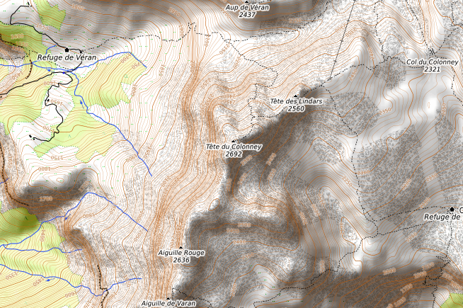 carte réalisée sur umap This map may be incomplete, and may contain errors. Don't rely solely on it for navigation.